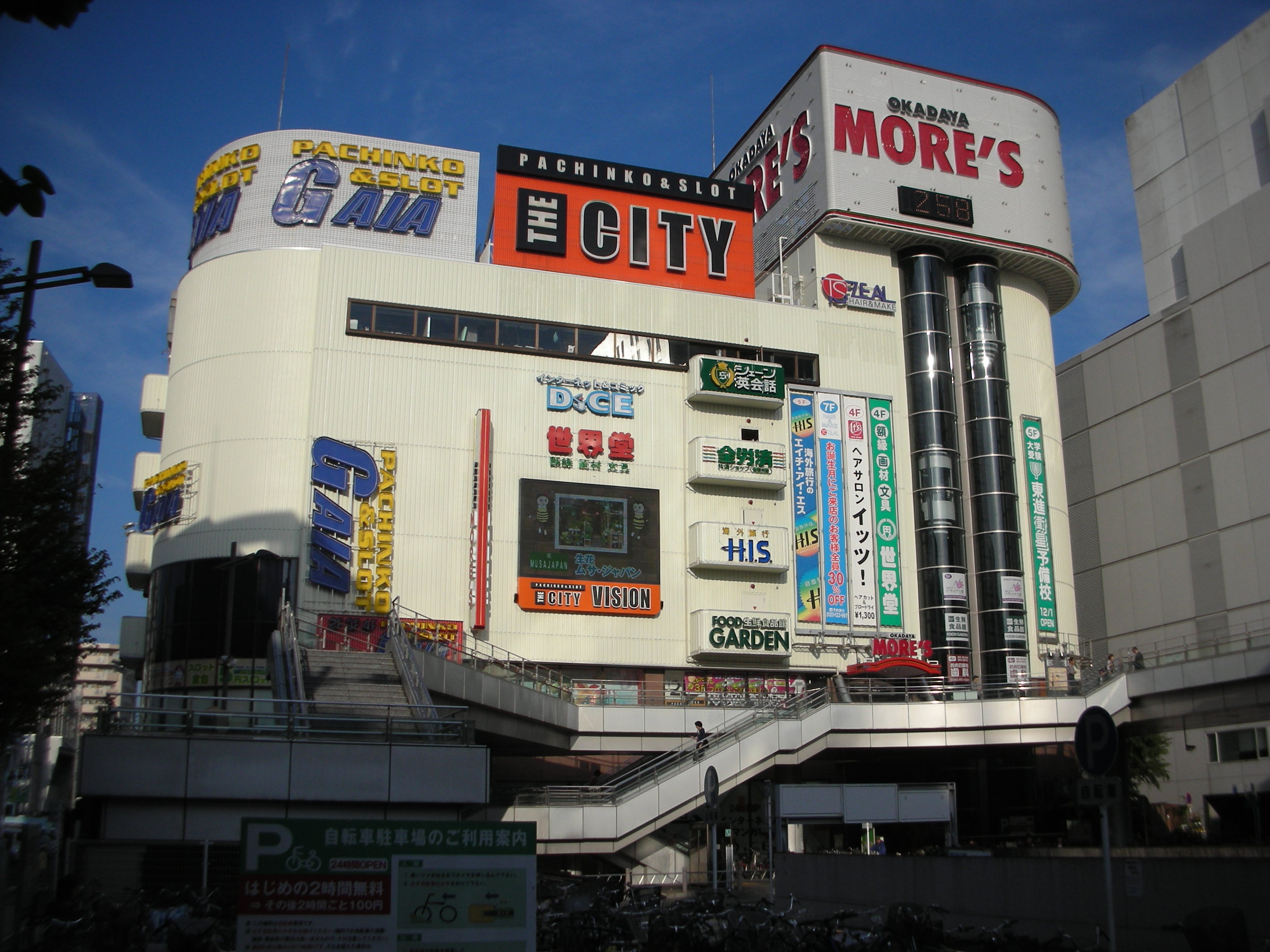 相模大野岡田屋モアーズの外観